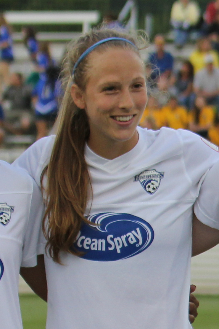 Julie King (Boston Breakers)